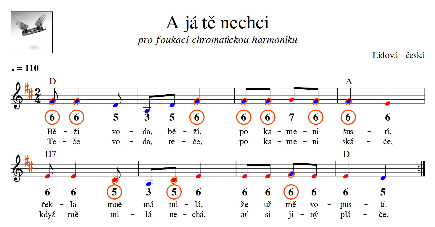 Tabulatura pro foukací chromatickou harmoniku s 12-ti dírkami v ladění C.